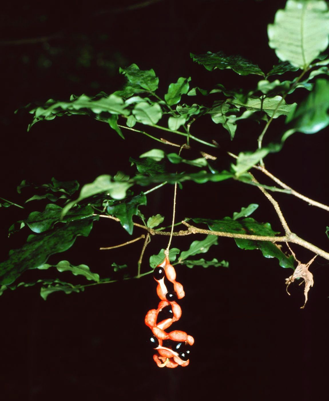 Cojoba valerioi, Hülsenfrüchtler (Fabaceae), Mimosengewächse (Mimosoideae) – Costa Rica: Prov. Guanacaste, Cordillera de Guanacaste, Parque Nacional Rincón de la Vieja